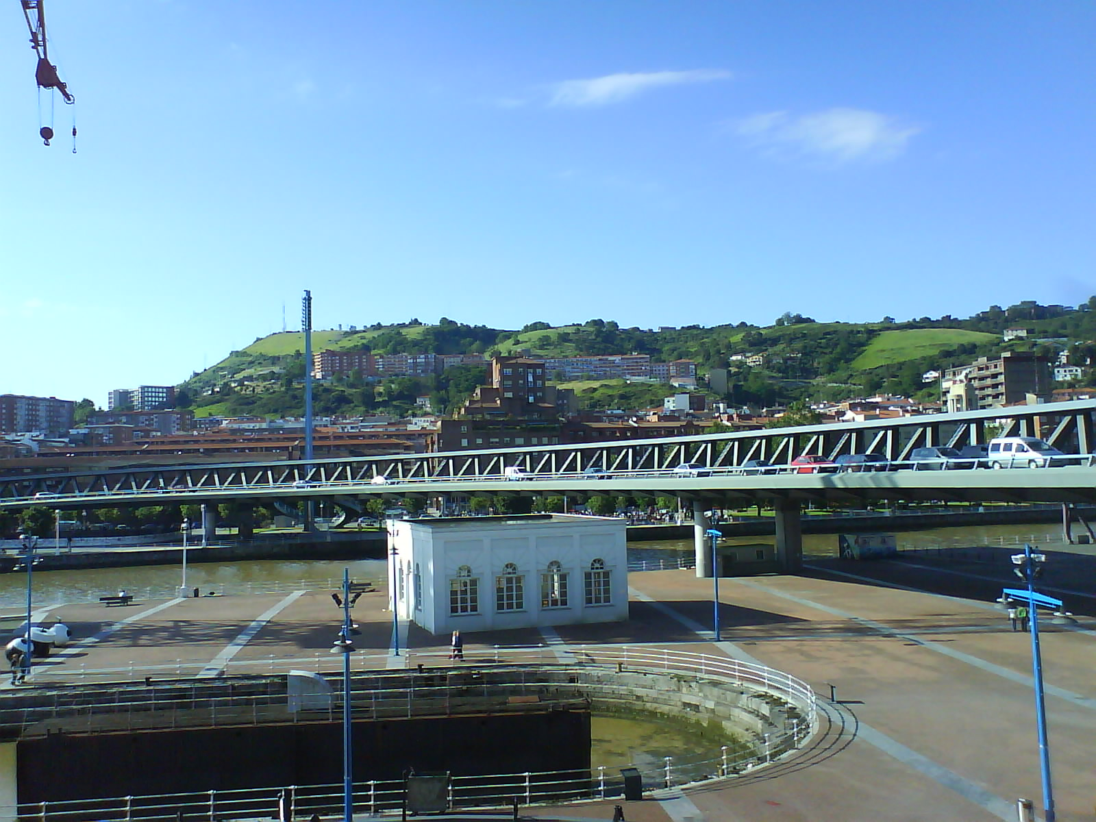 Euskalduna Zubia eta Bilboko Itsas Museoa